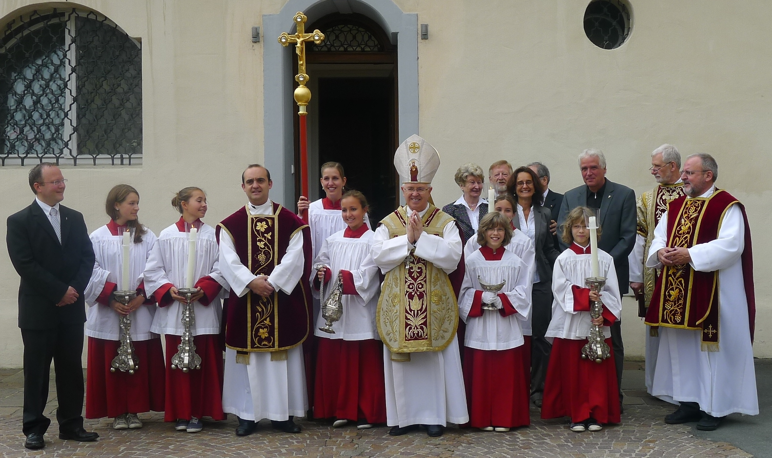 Erzbischof Julian Barrio Barrio bei einem Besuch in Biberach/Riß an Christi Himmelfahrt 2011. Er nahm dort an einem Gottesdienst in der Stadtpfarrkirche St. Martin teil. Biberach/Riß liegt am Jakobsweg.